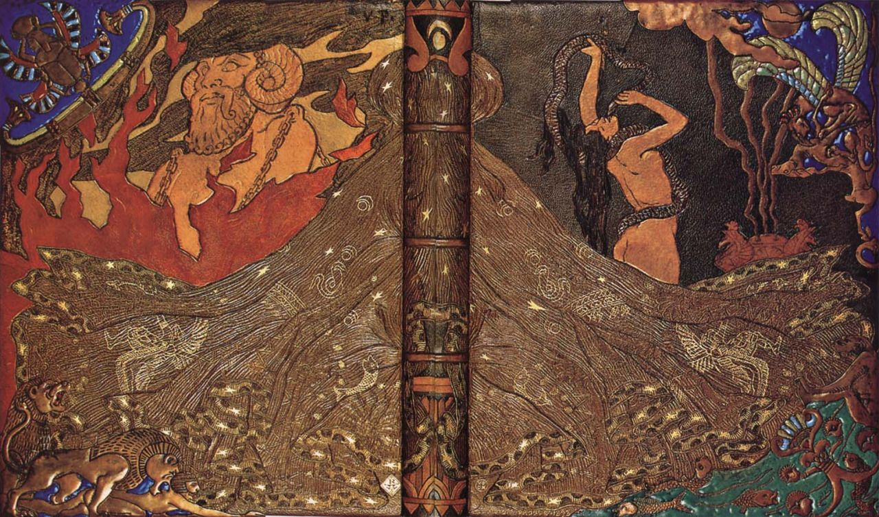 Reliure de livre. Nancy, Musée de l’École de Nancy.